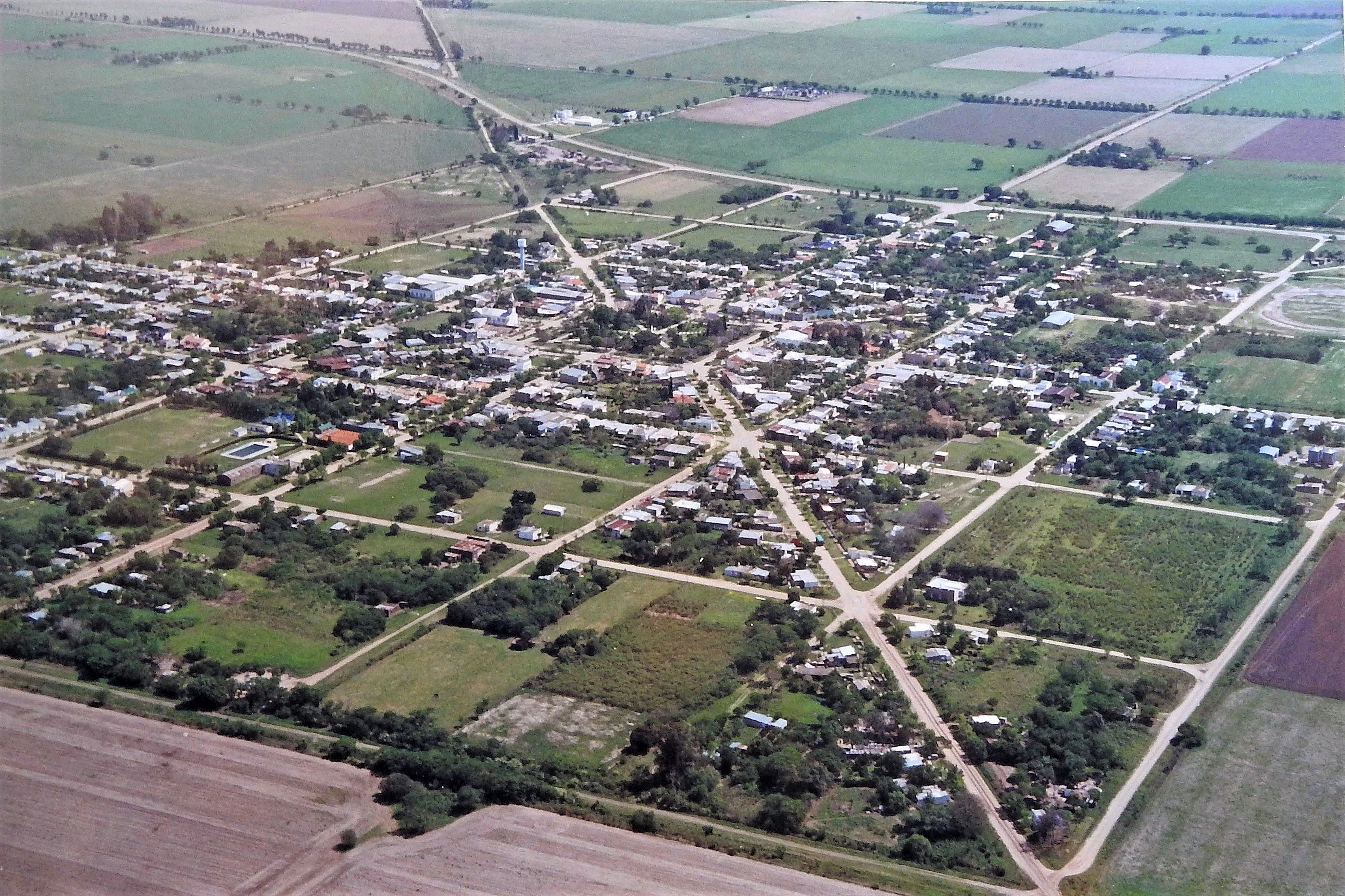 Ilustración de Progreso, en vuelo en avioneta, con foto tomada por Román Hülsberg